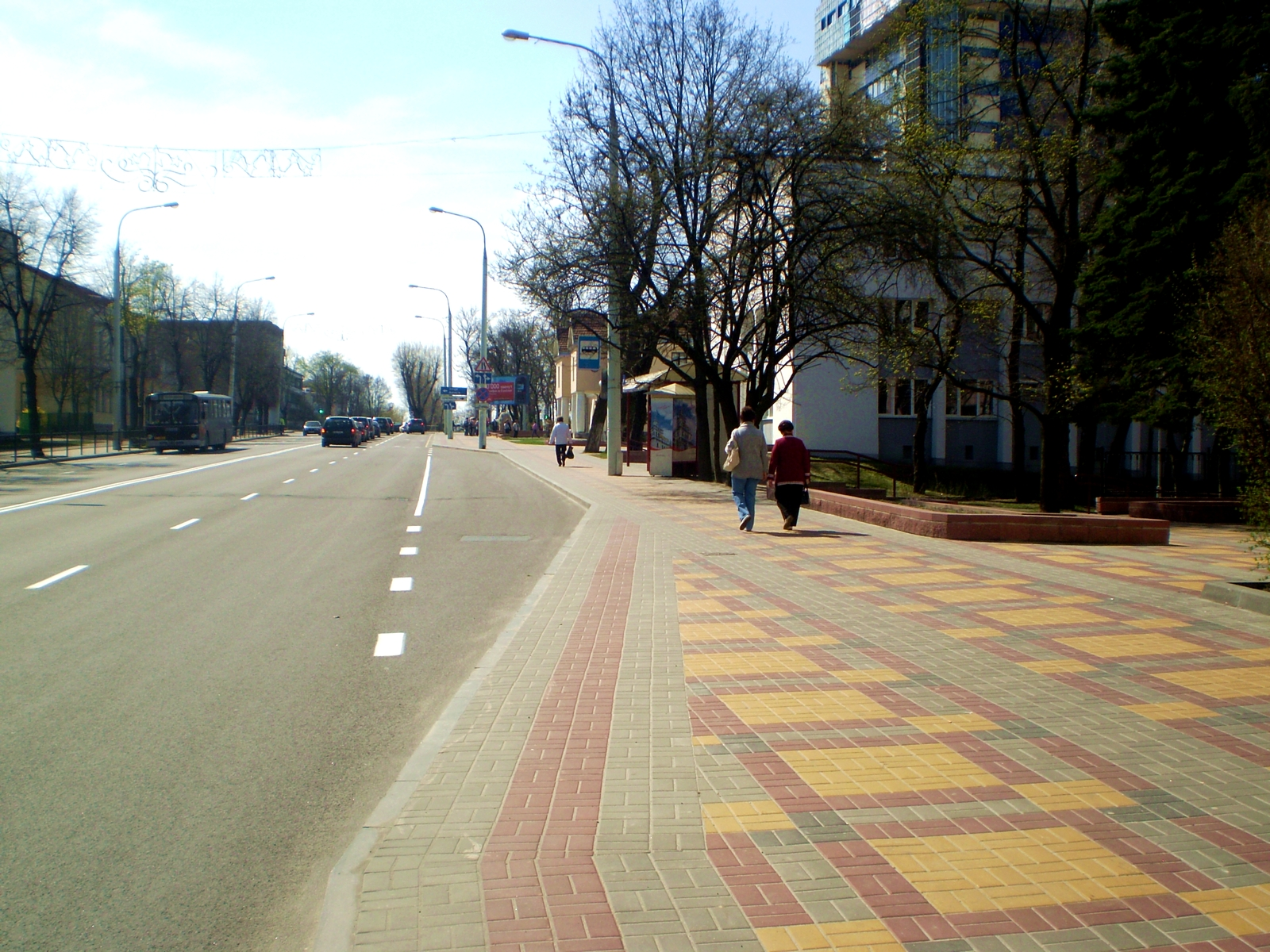 Прыпынак «Музей выратаваных каштоўнасцяў»